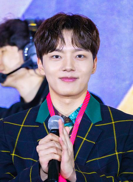 20191215 여진구 tvn 즐거움전 델루나